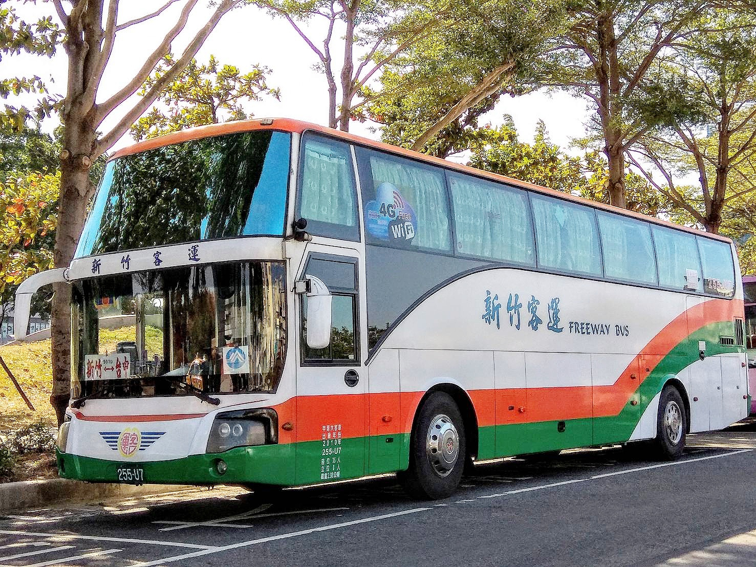 新竹客運FUSO RM11GNL大客車255-U7